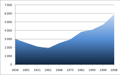 Graphique de la population de Noyal S/Vilaine